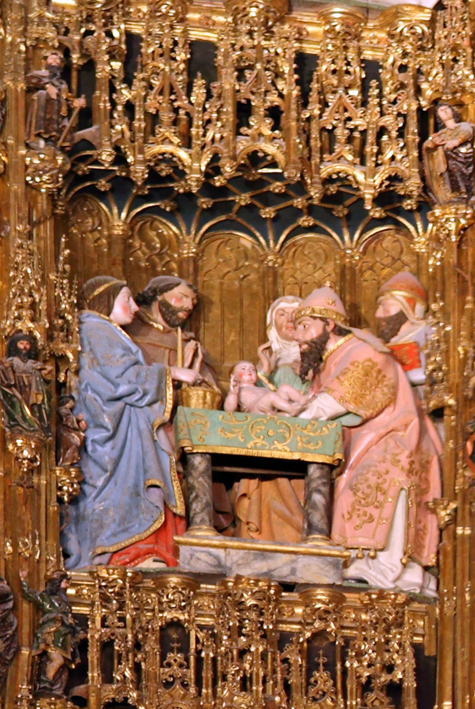 Presentación de Jesus en el Templo, detalle del retablo mayor de la Catedral de Toledo (España)